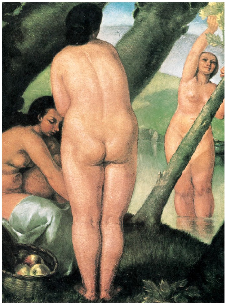 “Bañistas” Jenaro Urrutia